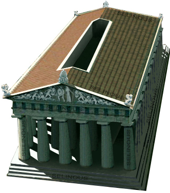 Selinous, opera propria, 27/3/2007. Ricostruzione del tempio della Vittoria, Imera, (Sicilia) Altre versioni it::Immagine:Imera tempio della vittoria mod.jpg (senza firma dell'autore in alto a sinistra)